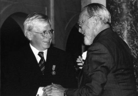 K.A. van der Hucht ontvangt van Prins Bernard de Zilveren Anjer)